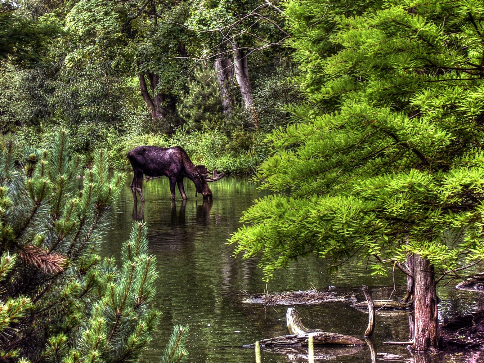 An elk drinking